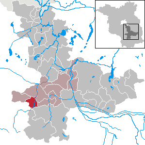 Drahnsdorf in Brandenburg (Country) - District Dahme-Spreewald